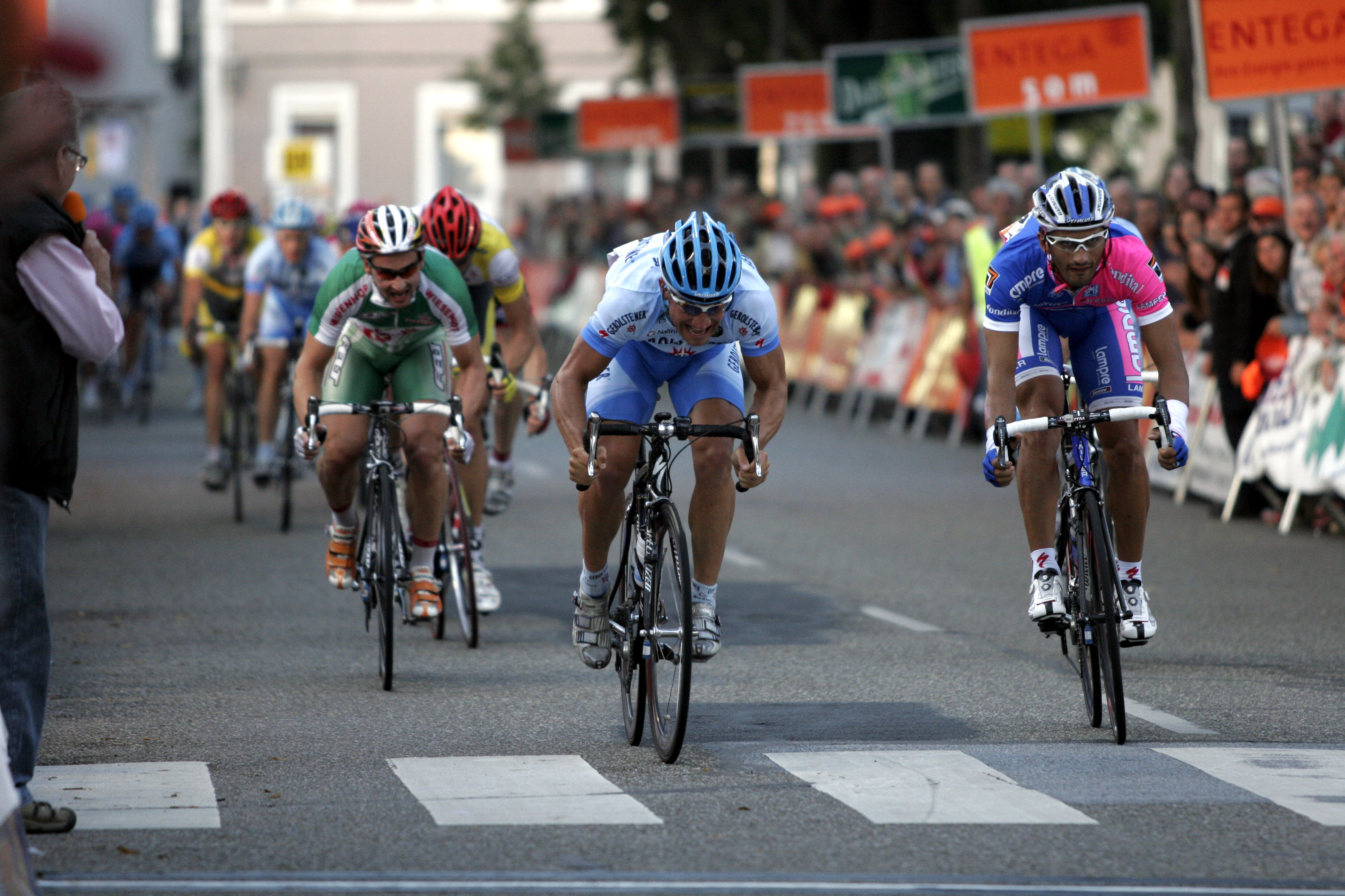 Tigersprung im Radsport. Phase 1: der Sprint. Aufgenommen am 2. August 2007 in Lorsch (Südhessen) beim Entega Grand Prix. In der Bildmitte Robert Förster (Team Gerolsteiner) und rechts Daniele Bennati (Team Lampre-Fondital)